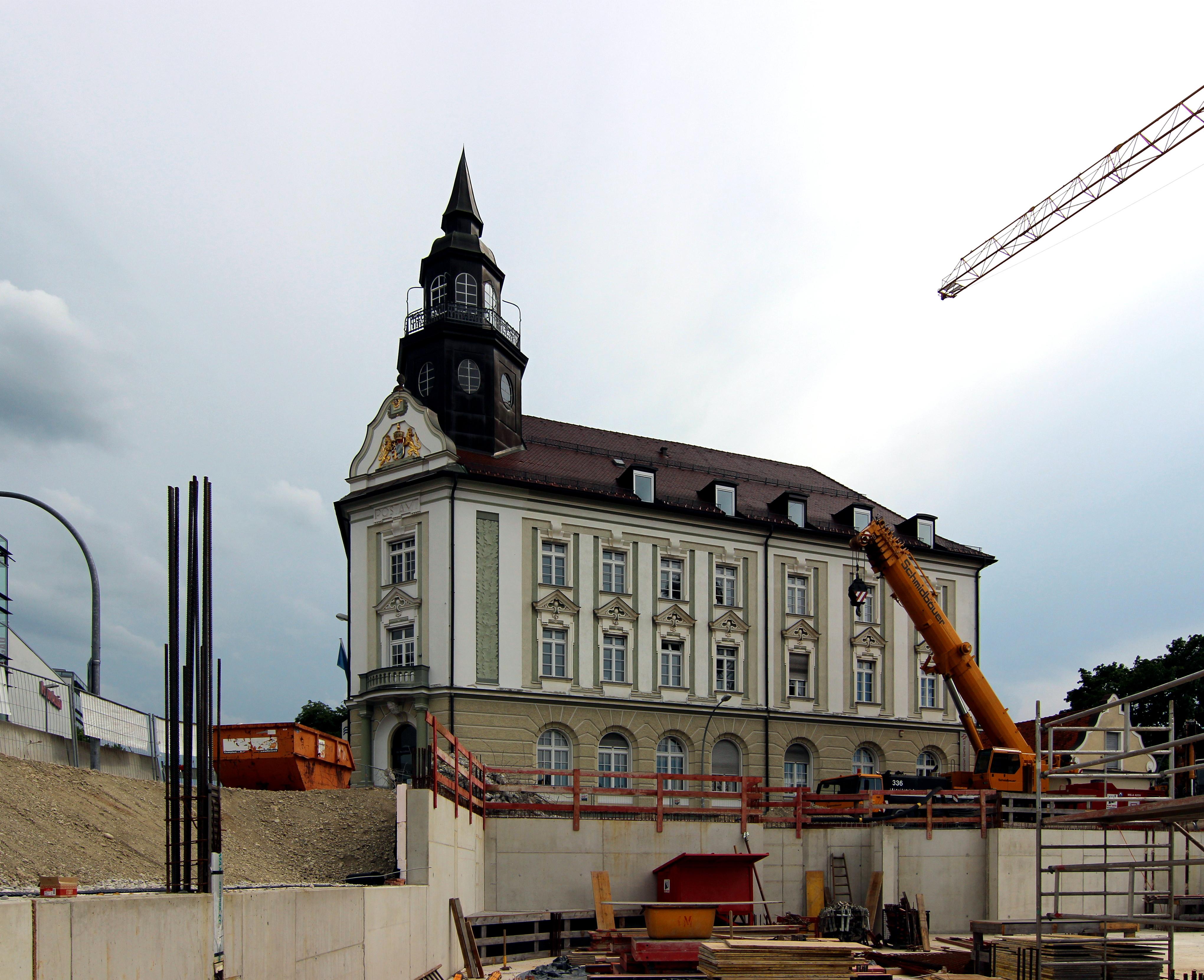 Altes Postamt, Bahnhofstraße, Kempten - mit nördlich davon liegender Dauerbaustelle.